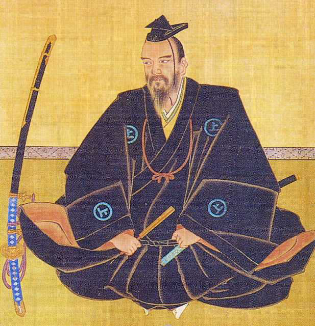 村上景親(1558年－1610年)肖像。村上武吉の次男。村上元吉は兄。